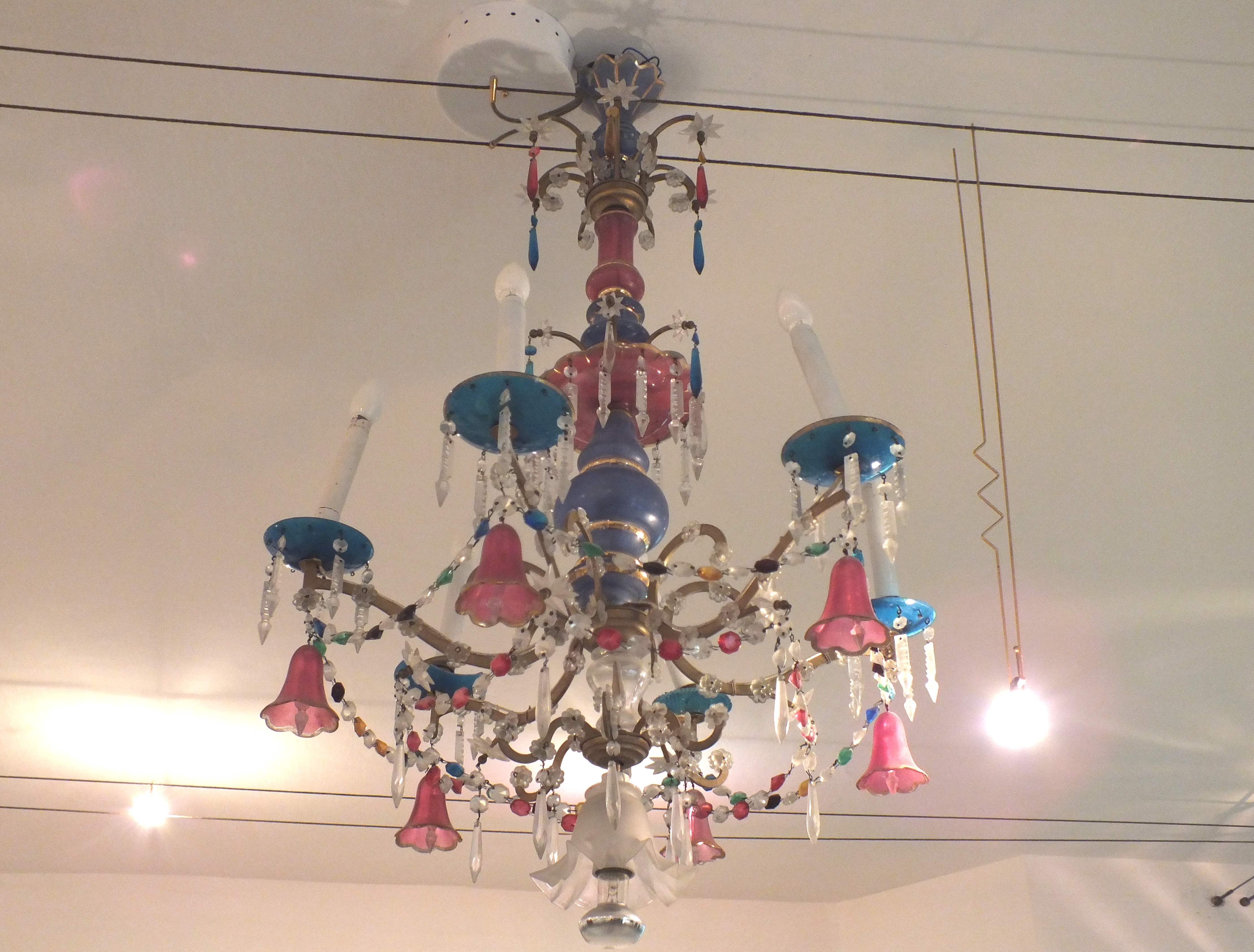 Stari Grad, Kirche St. Peter und Dominikanerkloster